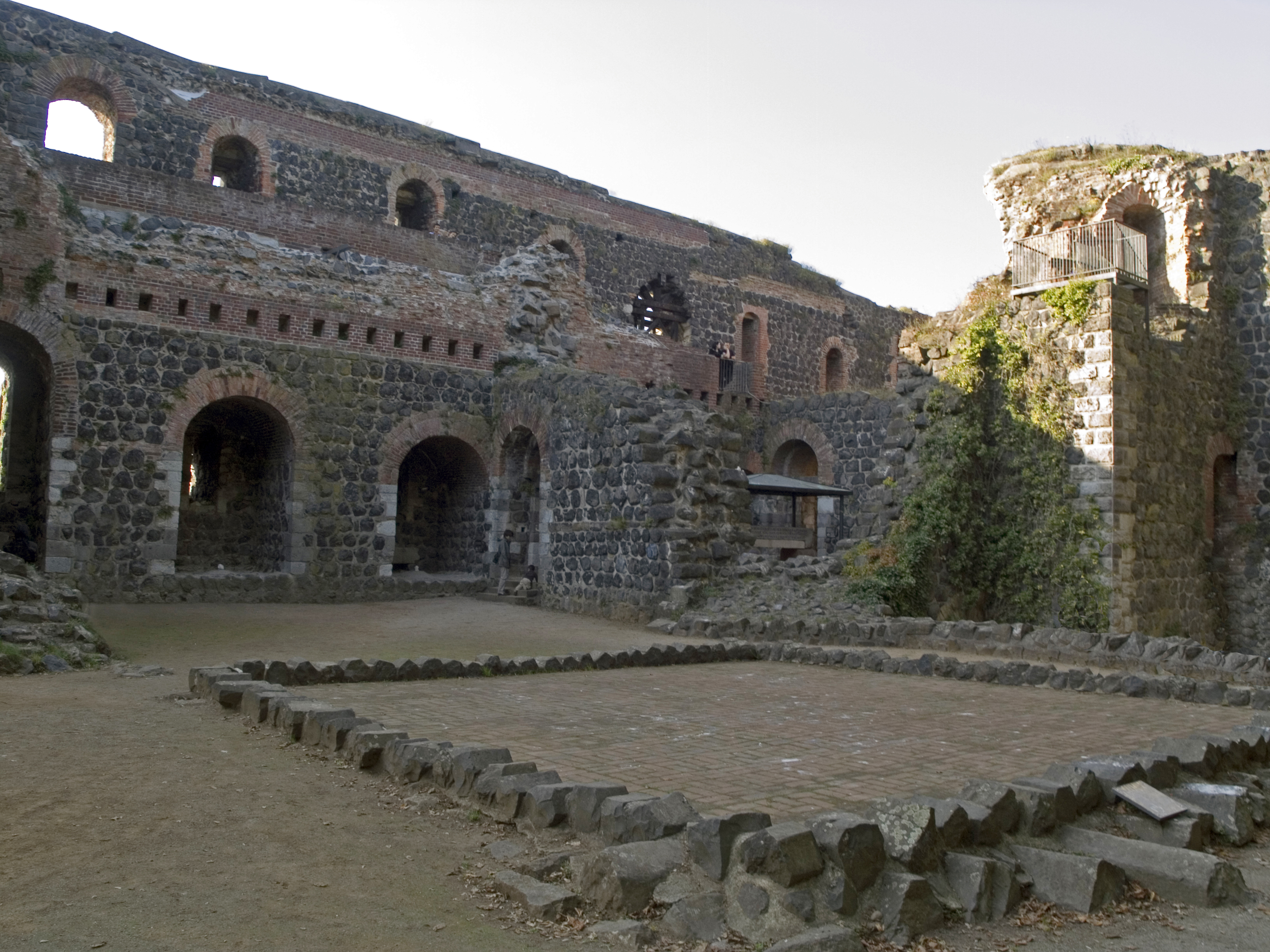 Северный Рейн - Вестфалия, Дюссельдорф - руины императорского дворца в Кайзерверте